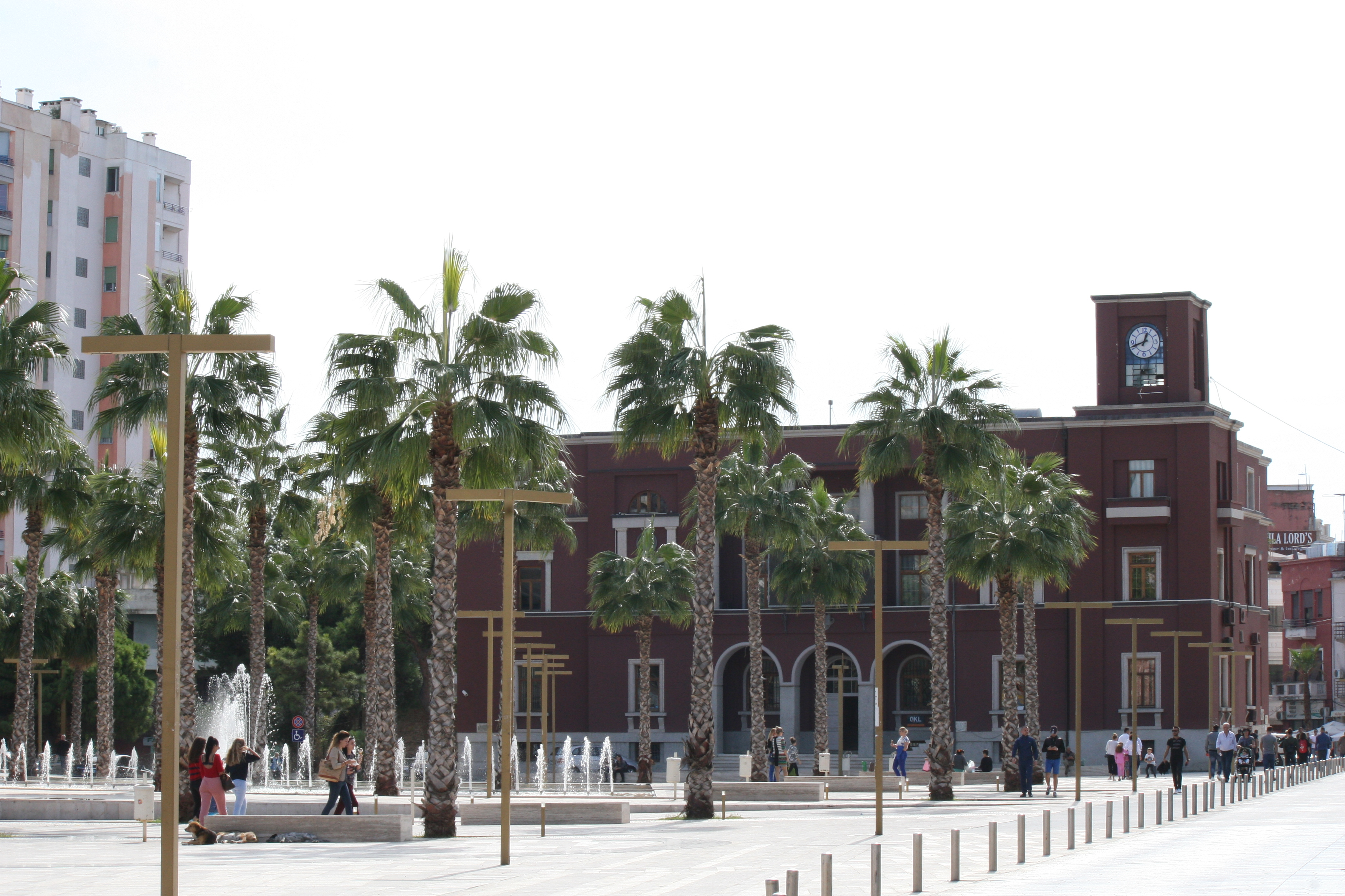 Ndërtesa e Bashkisë së Durrësit është ndërtuar në vitin 1926, duke u renditur kështu ndër ndërtesat më të vjetra të qytetit që kryejnë ende funksionin fillestar të parashikuar.